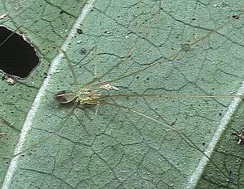 male Spermophora junkoae from Okinawa.